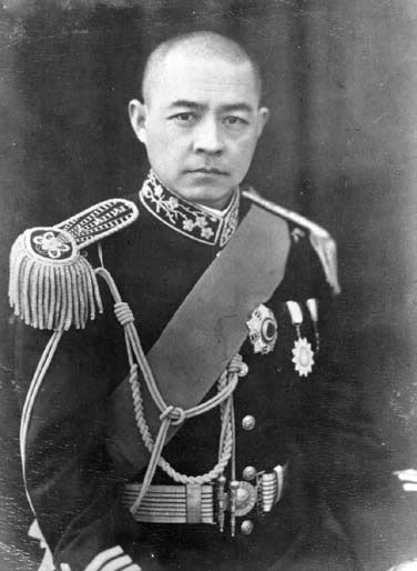 礼装姿の張。